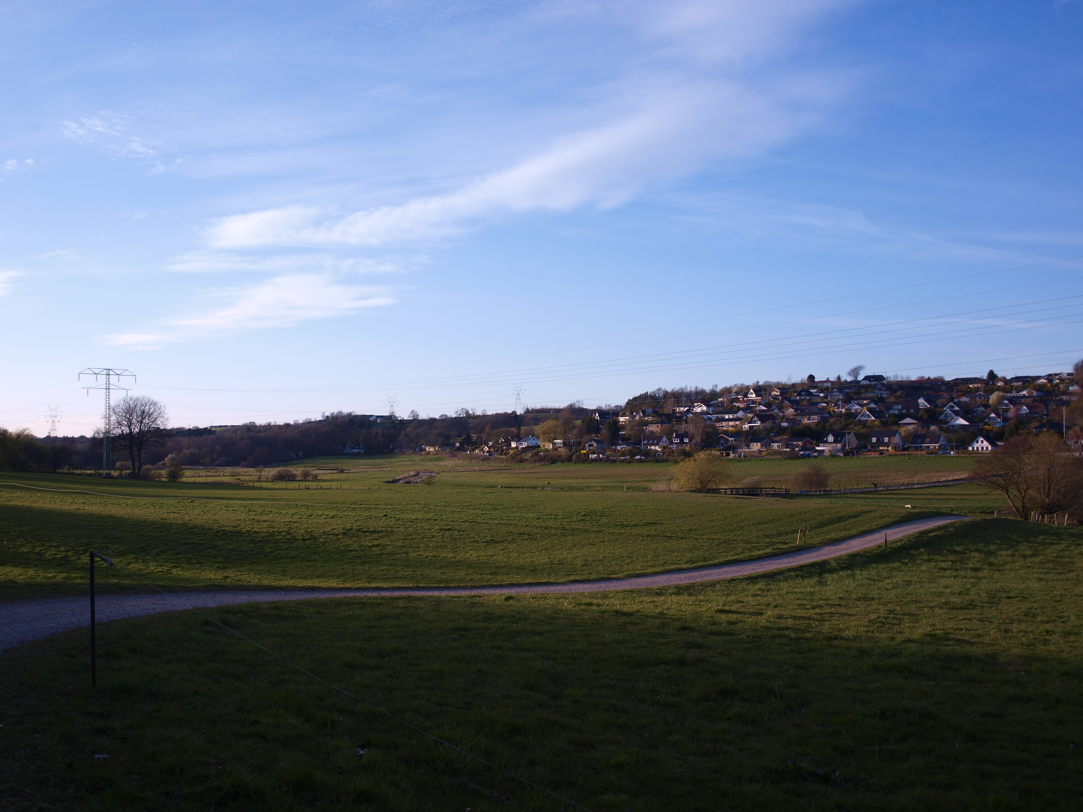 Plovfuren, naturområde i Kolding, 19. april 2015